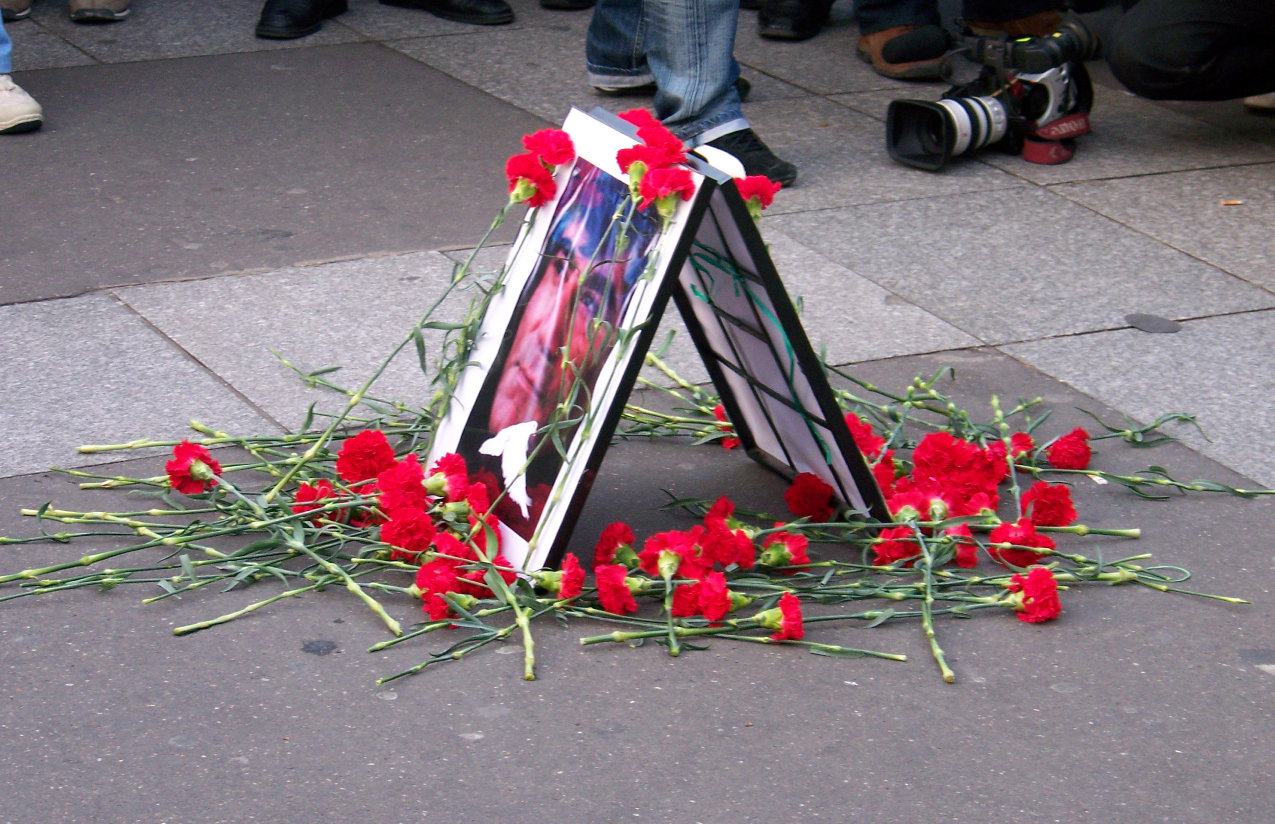 Marche silencieuse Hrant Dink